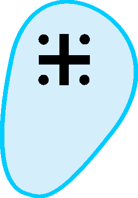 Grundmarkering i svenska sjökort. Fast hinder för sjöfart under vattenytan vid medelvattenstånd. Marine chart designation for a unvisible obstacle just below the surface of the water.